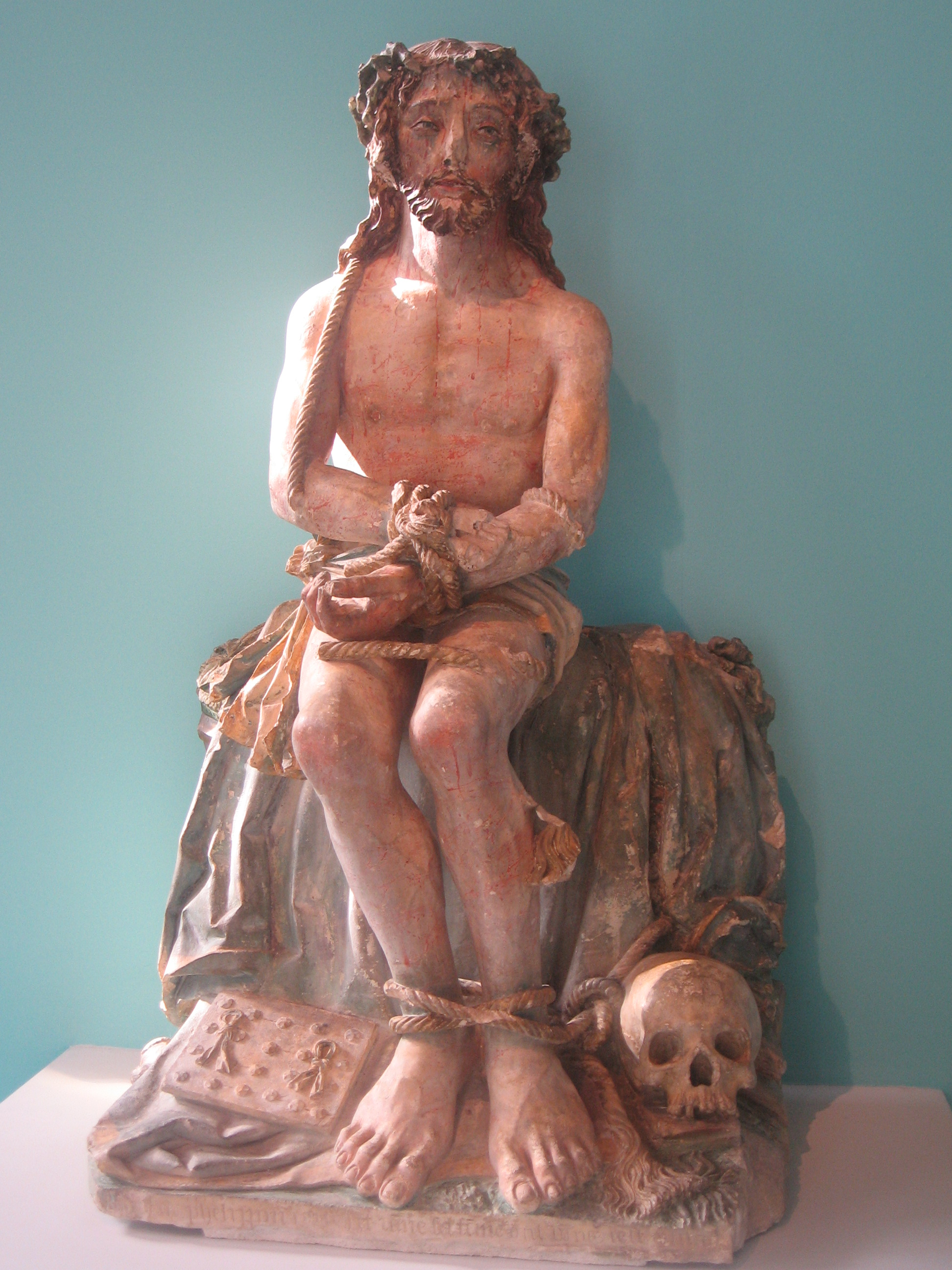 Exposition "Le Beau XVIe siècle". Christ de Pitié, 1519. Statue, calcaire polychromé. Montreuil sur Barse (Aube) - Classé Monument historique le 15.02.1988